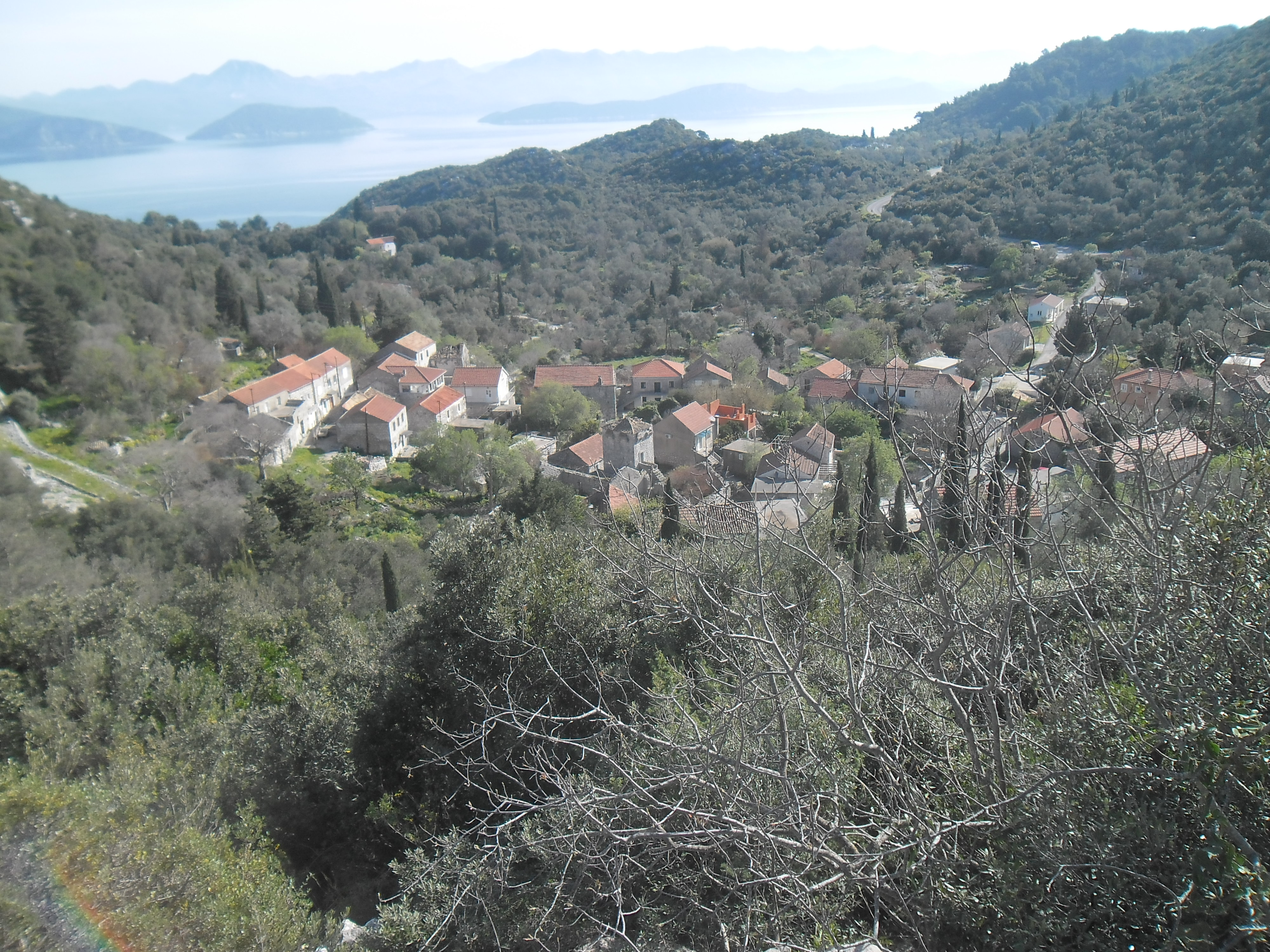 Korita na otoku Mljetu